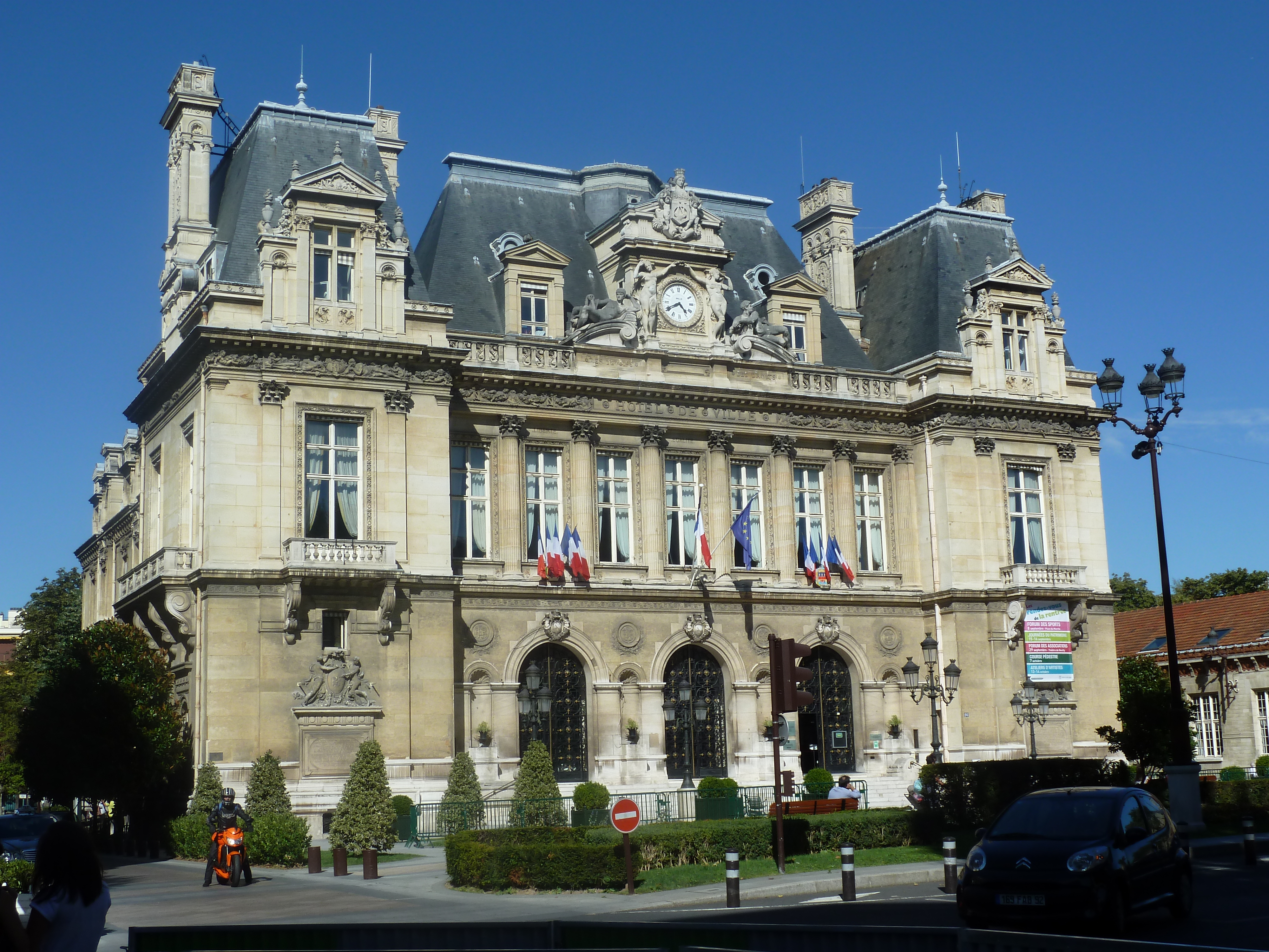 Neuilly - Mairie